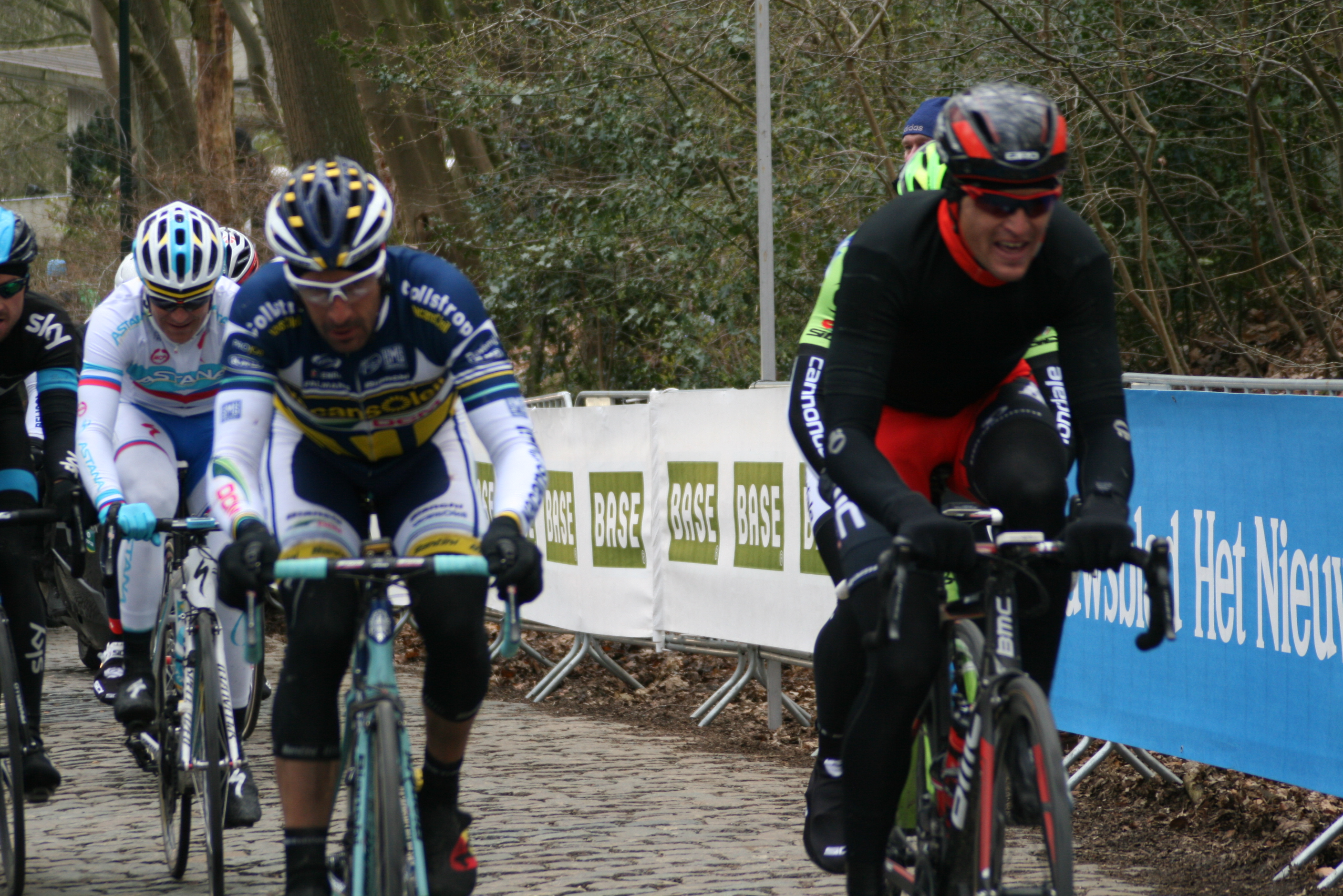 Gent-Wevelgem 2013, Kemmelberg